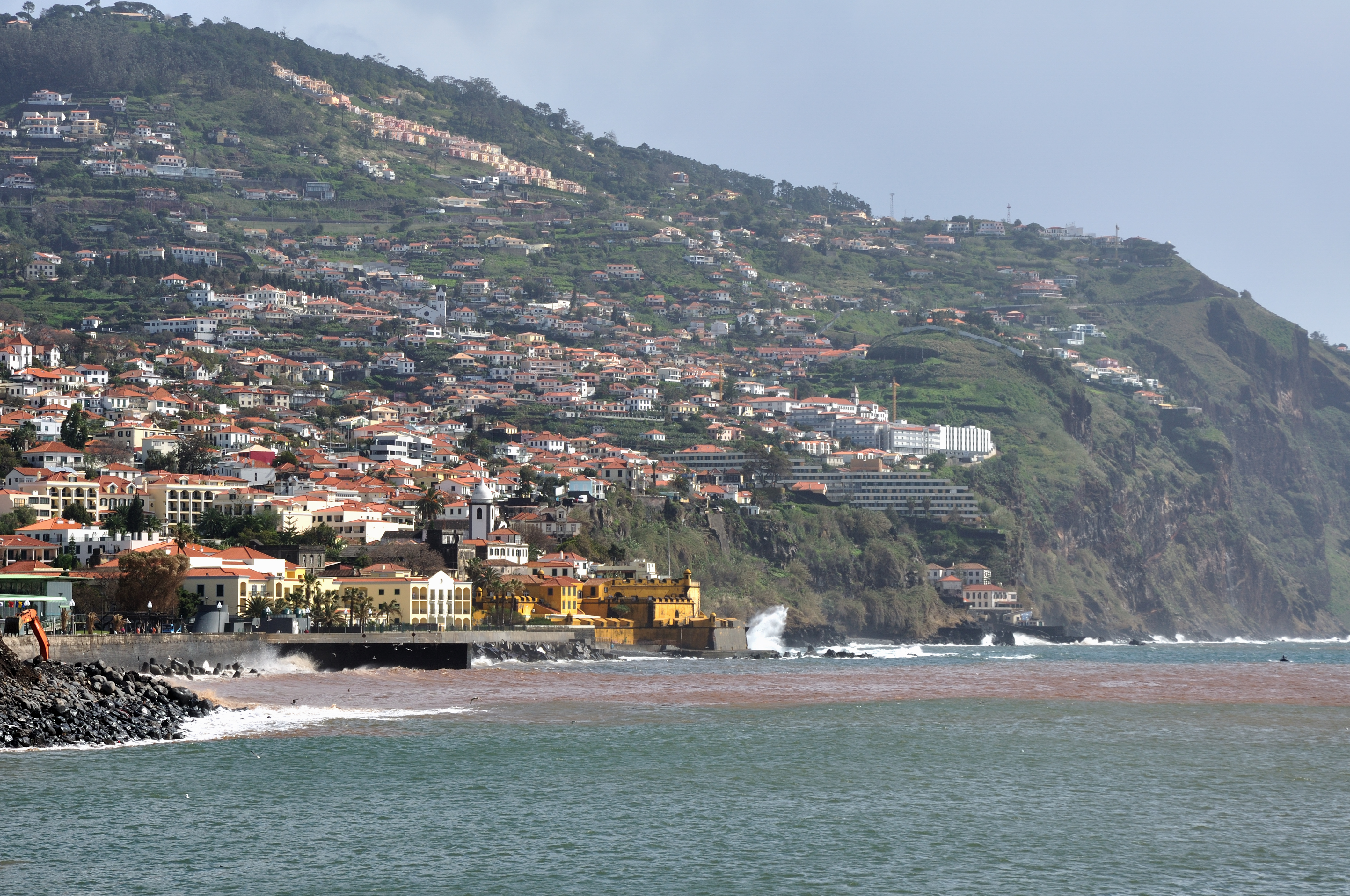 Portugal, Funchal